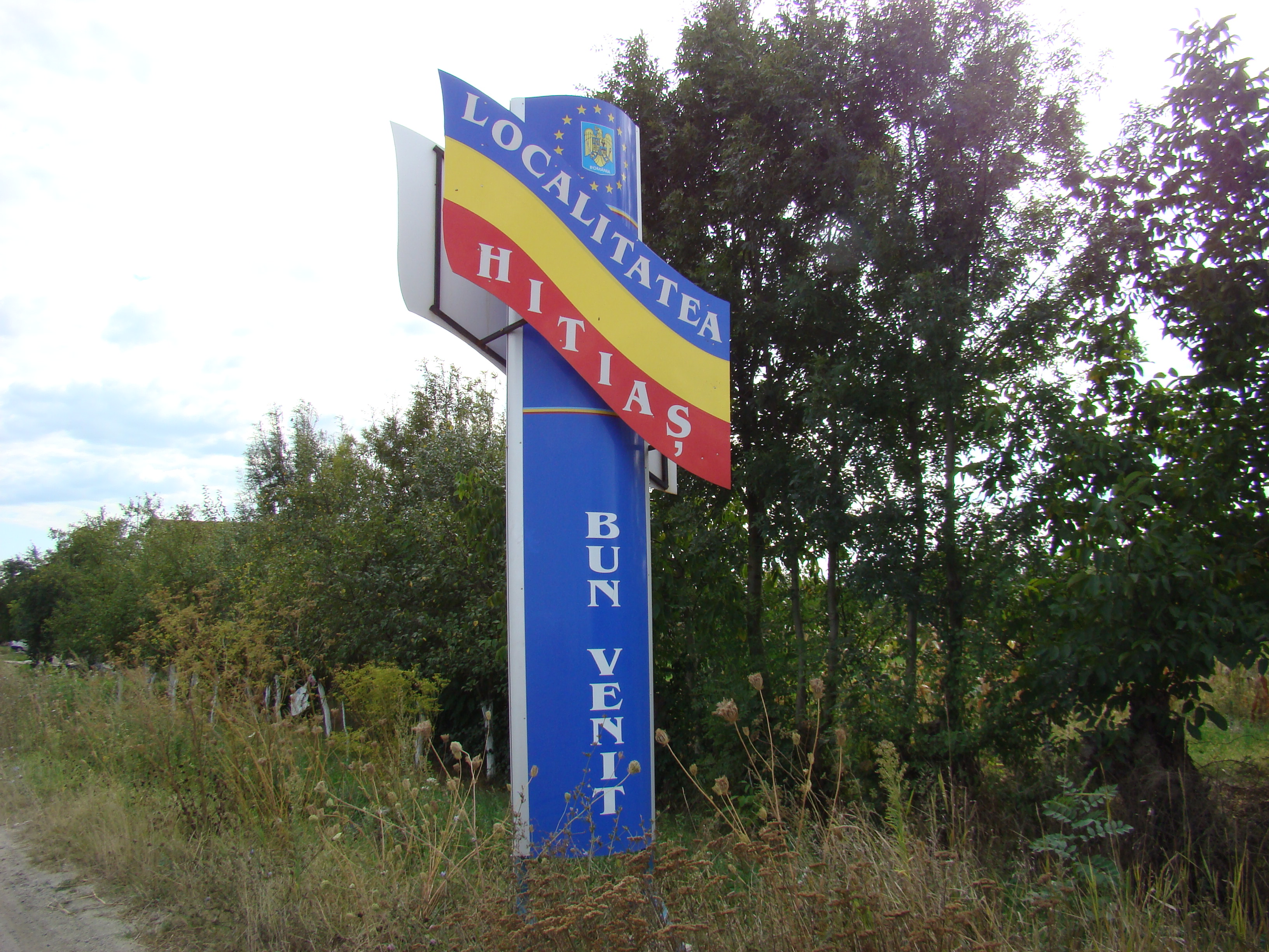 Hitiaș, Timiș